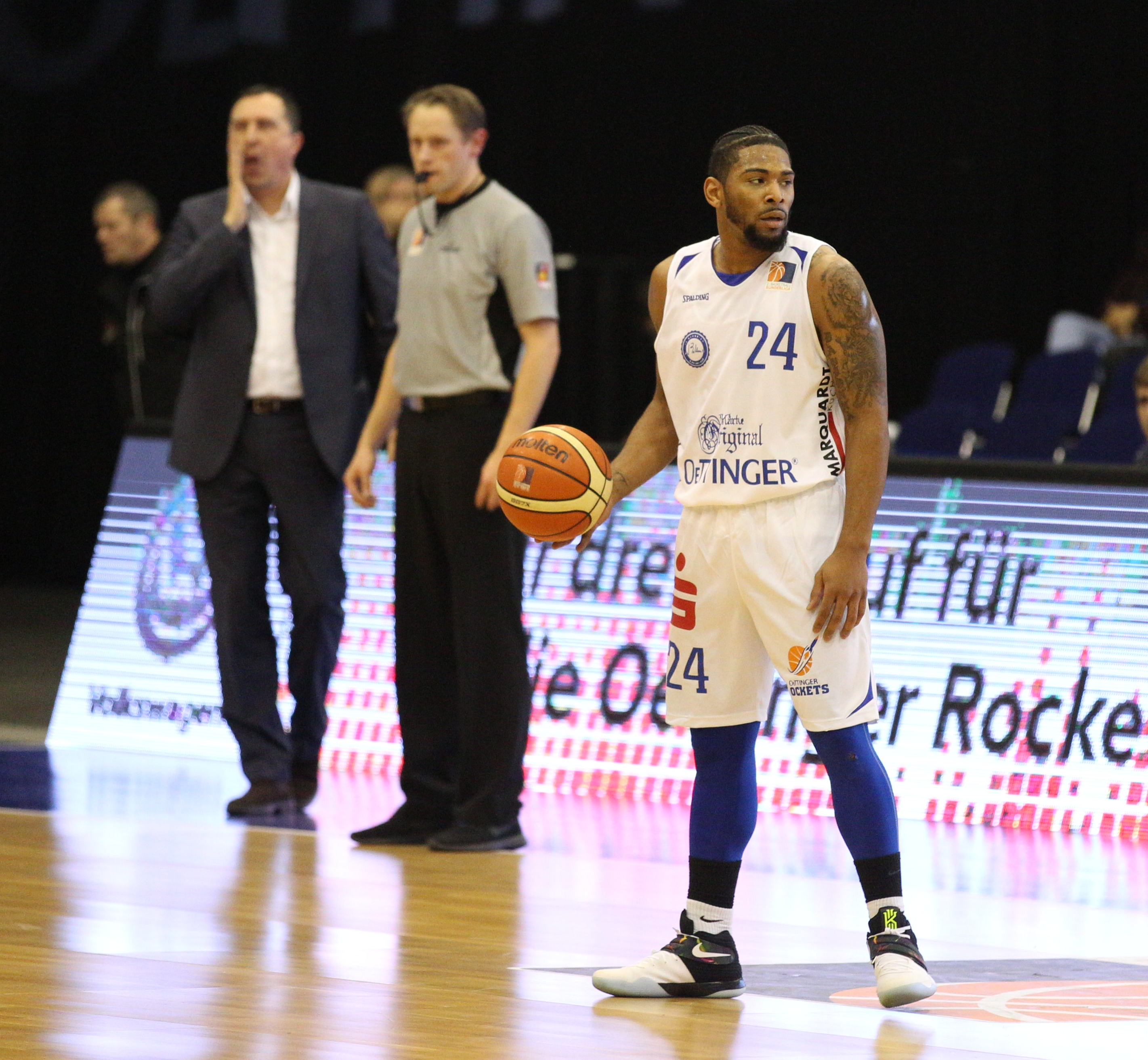 2. Basketball-Bundesliga (21. Spieltag; 2. Februar 2017; Game-ID: 102913): David Hicks (24, Oettinger Rockets)